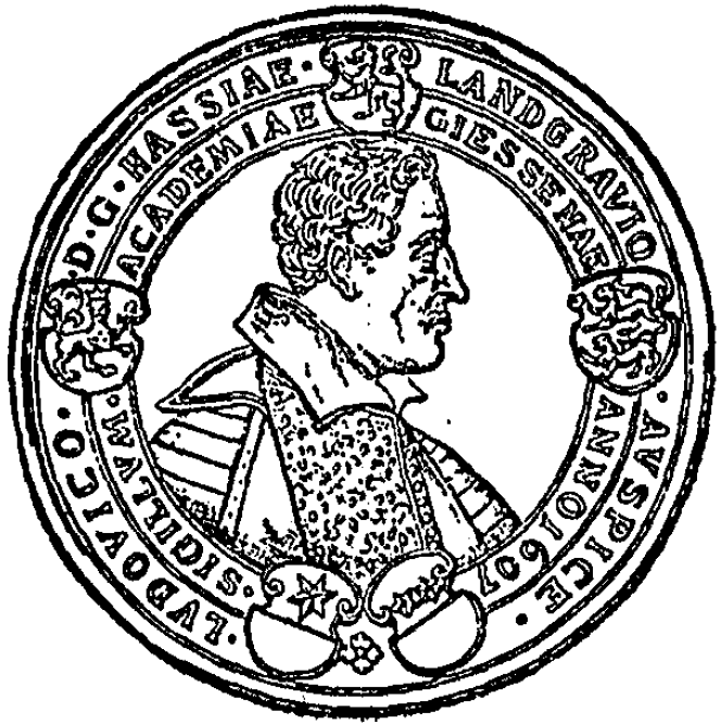 Siegel der Universität Gießen Ludoviciana mit Landgraf Ludwig